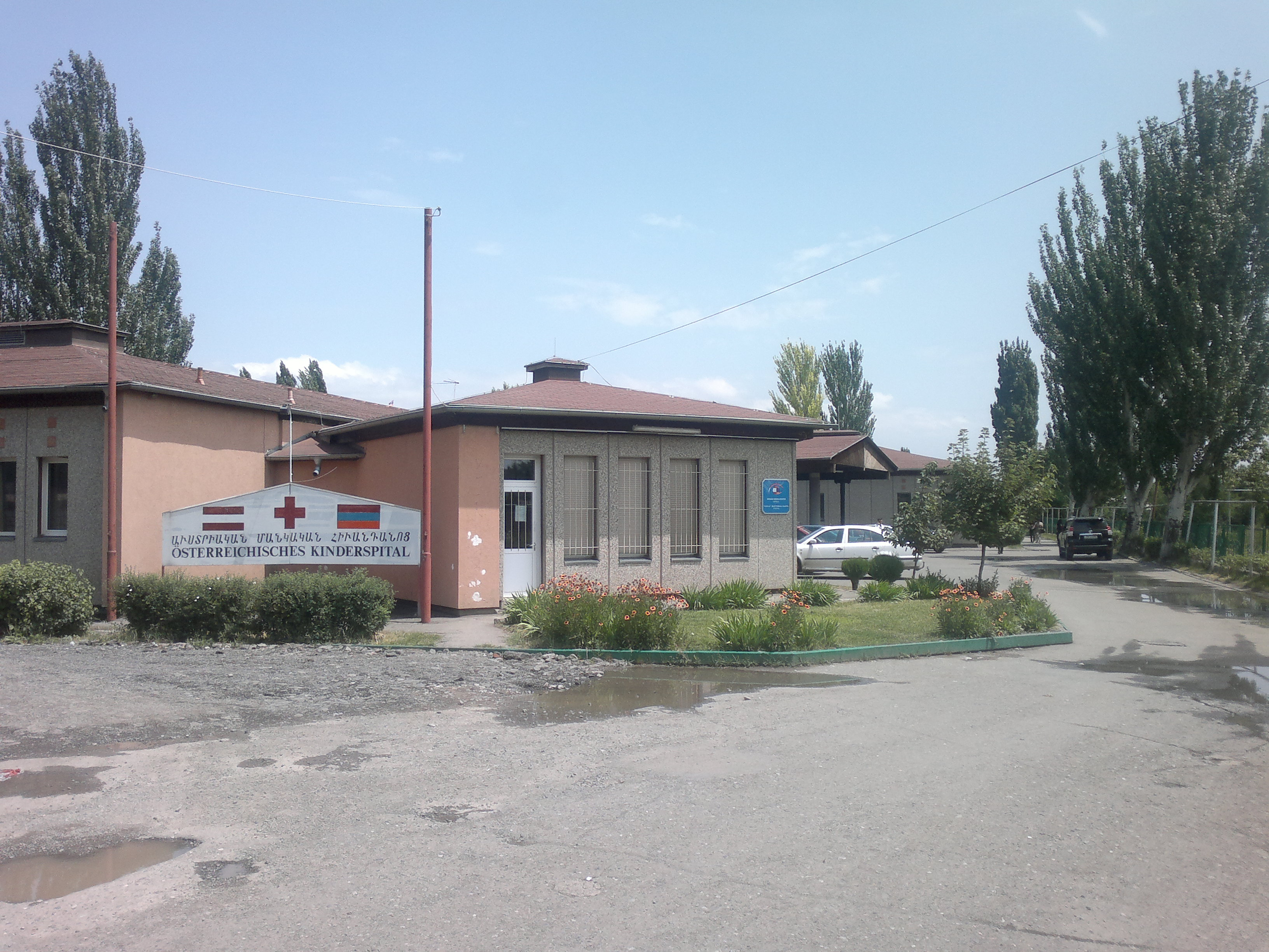 Ավստրիական մանկական հիվանդանոց